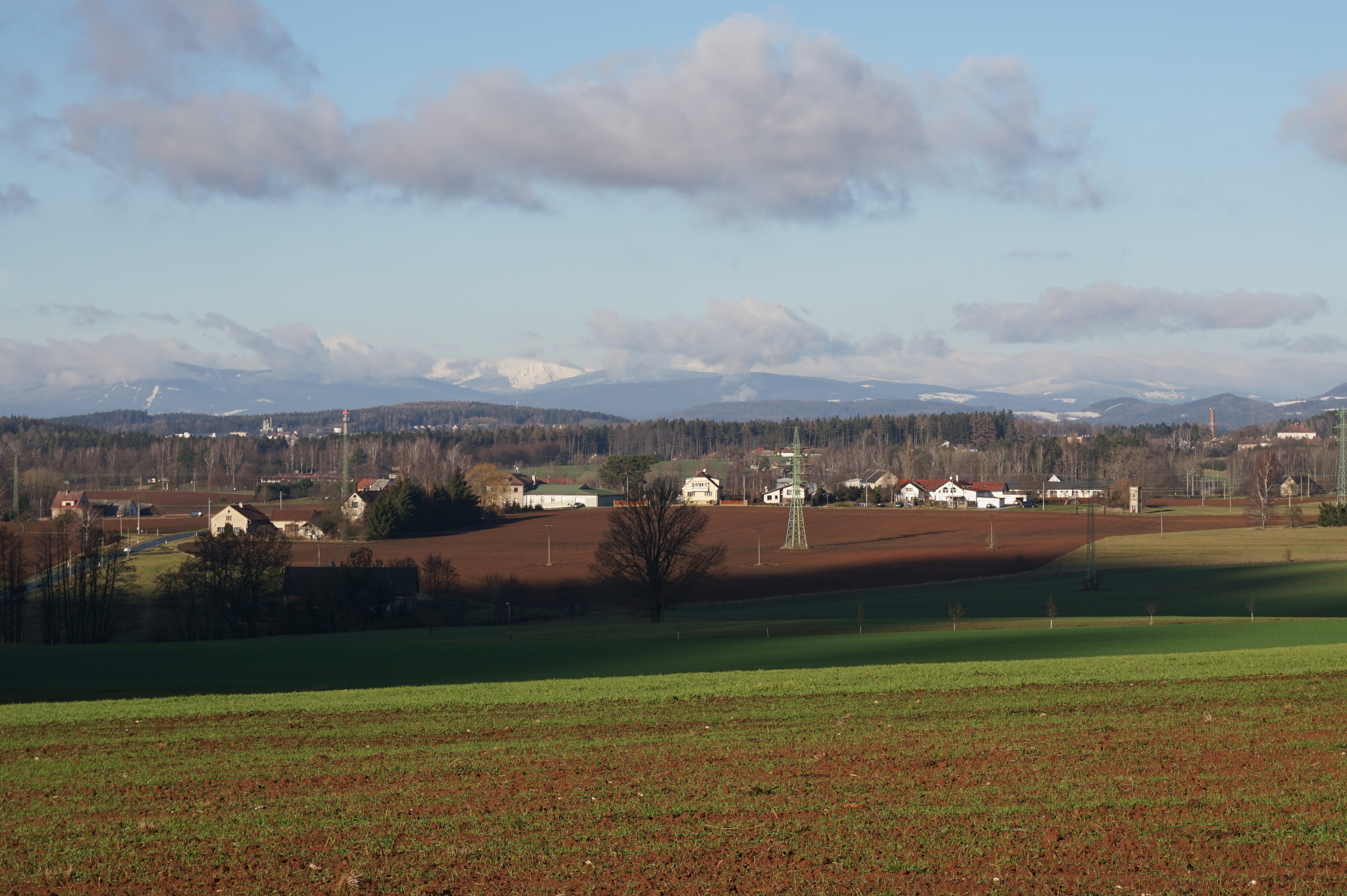 Zábrodí - celkový pohled od osady Horní Rybníky